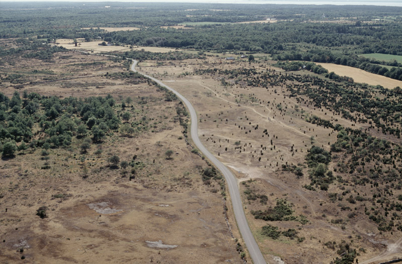 Gravfältet Noaks ark med skeppssättning RAÄnr Högsrum 83:1. Bilden är tagen mot (väderstreck): SV Motiv: Högsrum 83:1 Nyckelord: Flygbilder, Riksintressen Kategori: Slättbygd, Gravfält Gravfältet Noaks ark med skeppssättning RAÄnr Högsrum 83:1. Bilden är tagen mot (väderstreck): SV. Högsrum 83:1.